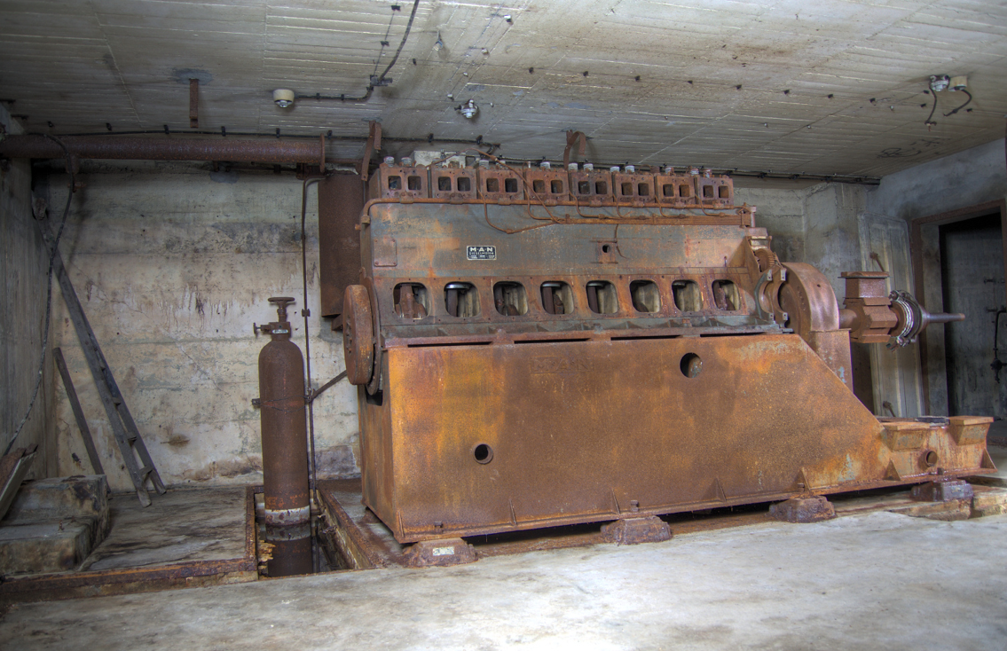 Stromaggregat im Anhalter Hochbunker in Berlin. Ausfall und Zerstörung Ende April 1945.